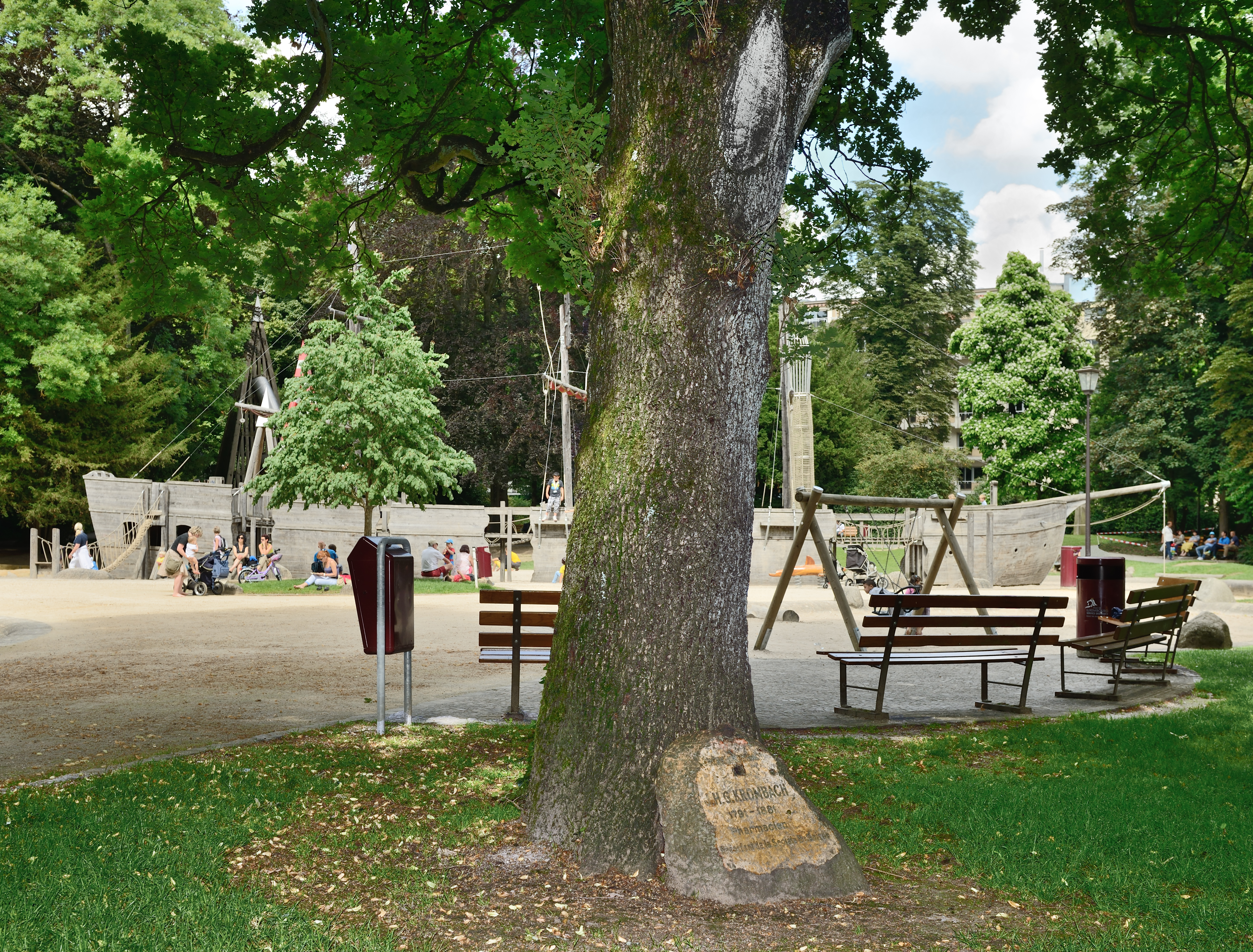 Luxembourg City: oak and plaque commemorating Jean-Henri-Guillaume Krombach (1791-1881), botanist. Unknown luxembourg-ville : chêne de kromabch, à kla mémoire de jean-henri-guillaume krombach (1791-1881), botaniste. Unknown d'krombach_eech am park vun der stad lëtzebuerg, zu éiere vum jean-henri-guillaume krombach (1791-1881), botaniker.